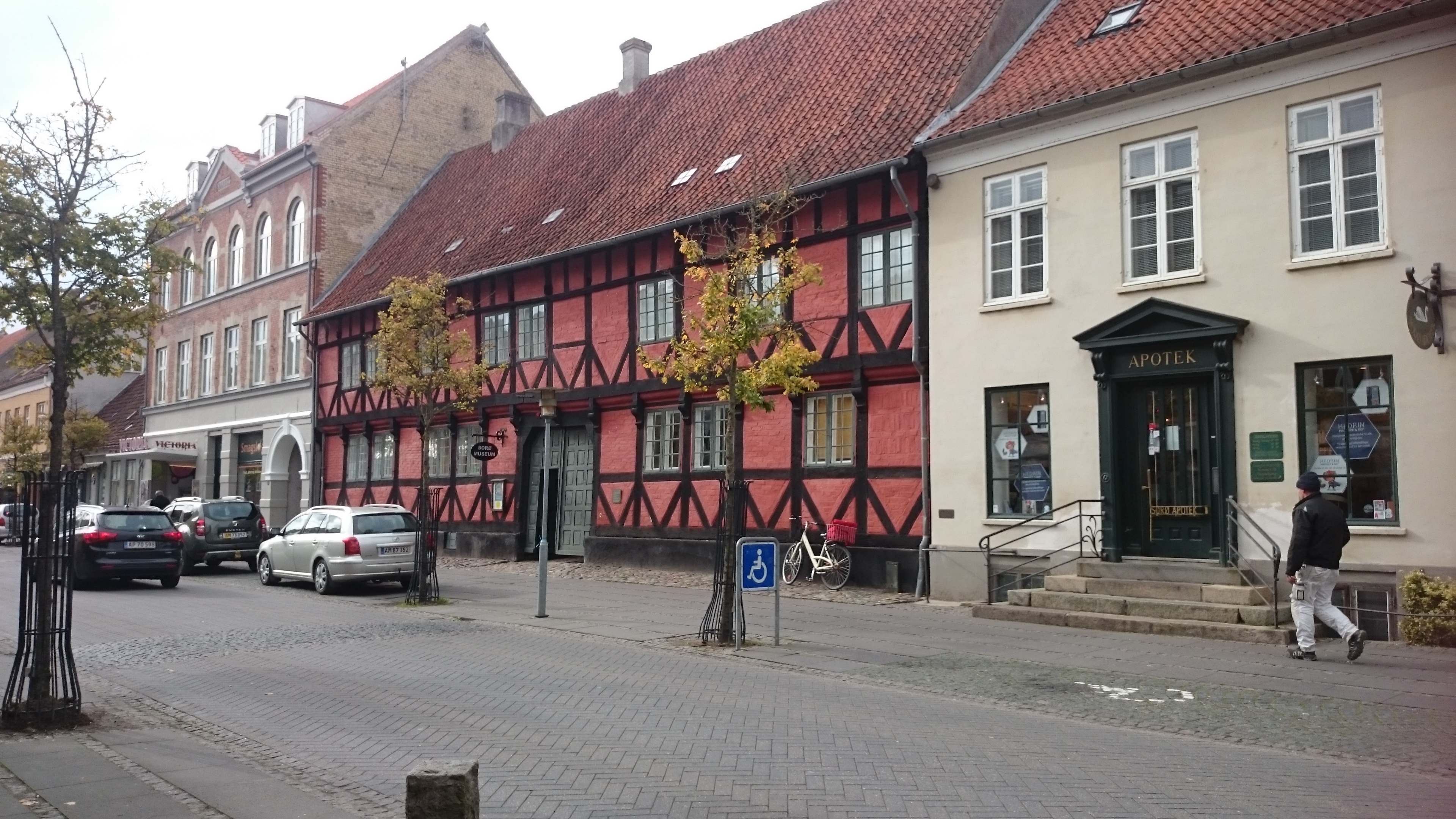 Sorø Museum i Storgade